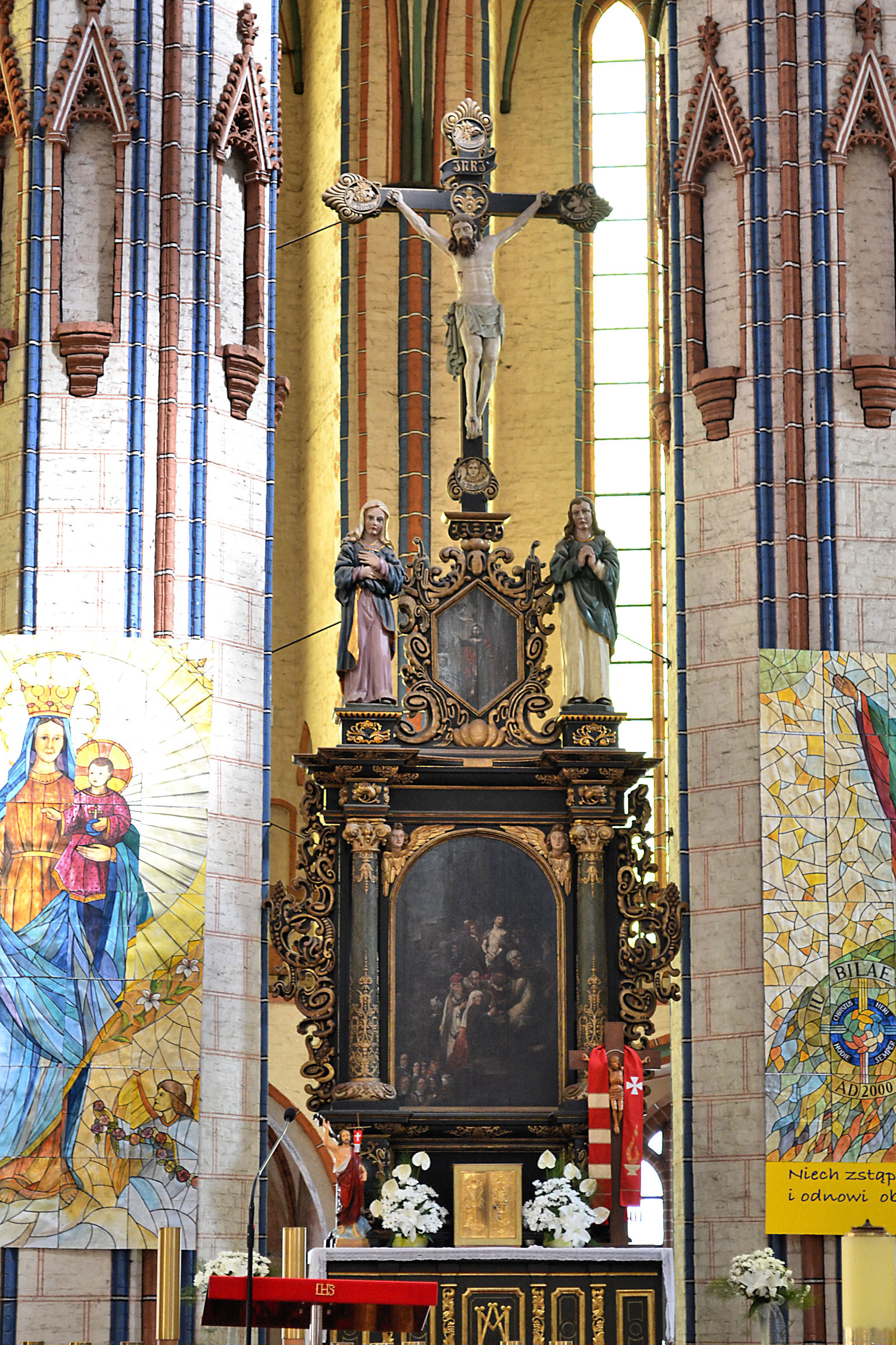 Katedra - kościół Mariacki w Stargardzie Szczecińskim